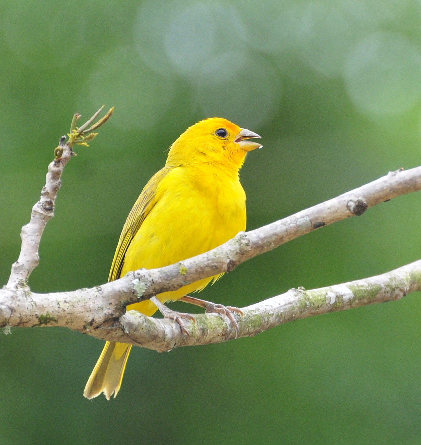 Lanchonete OASYS - Vale do Ribeira - Registro-SP - Brasil